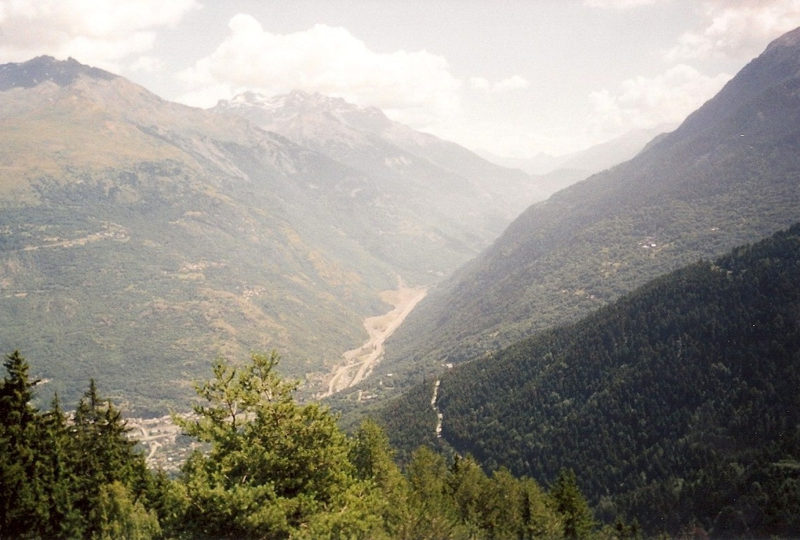 Vue à l'approche du Télégraphe